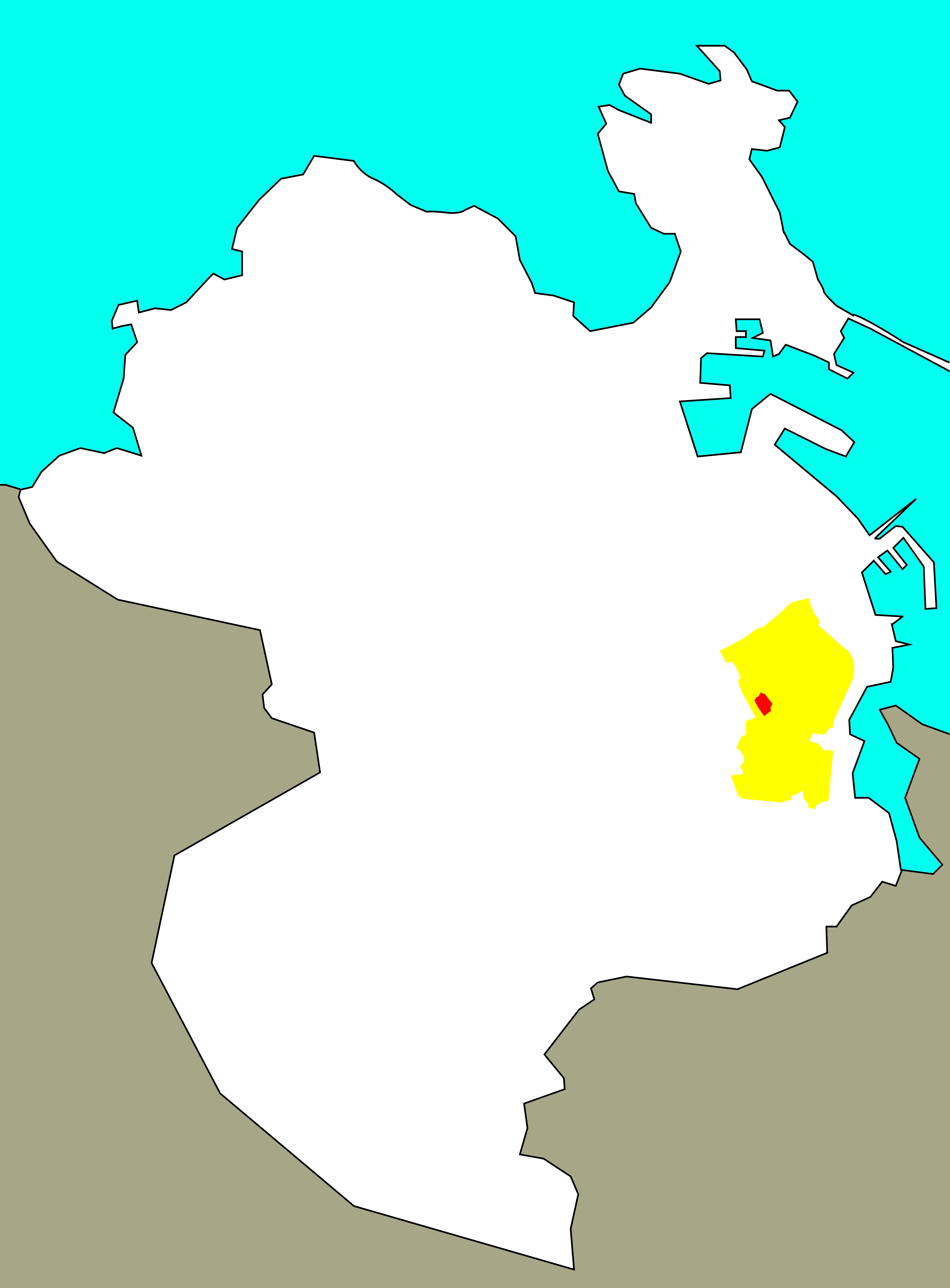 Situación de Eirís de Arriba no "barrio-territorio" de Eirís, segundo